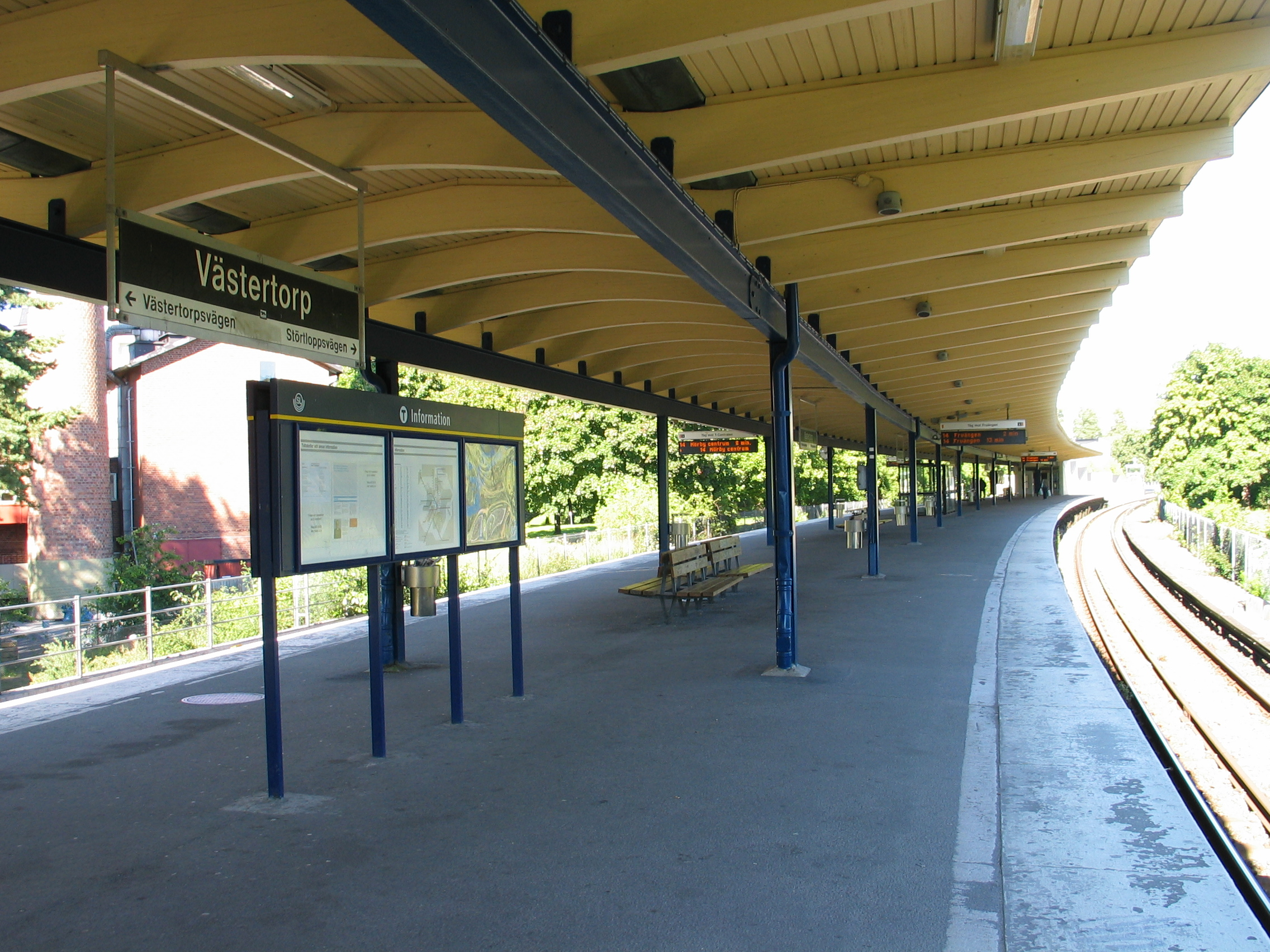 Västertorp, a metro station in Stockholm, Sweden.